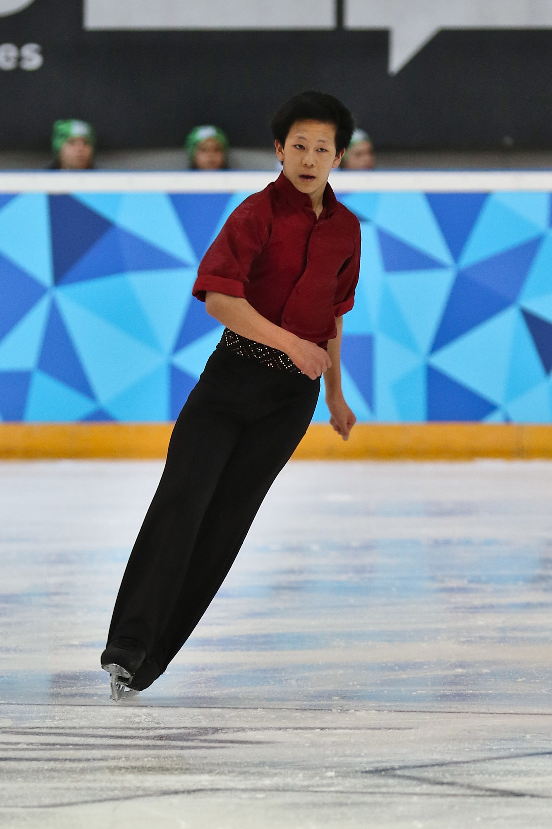 Lillehammer 2016 - Figure Skating Men Short Program - Adam Siao Him Fa